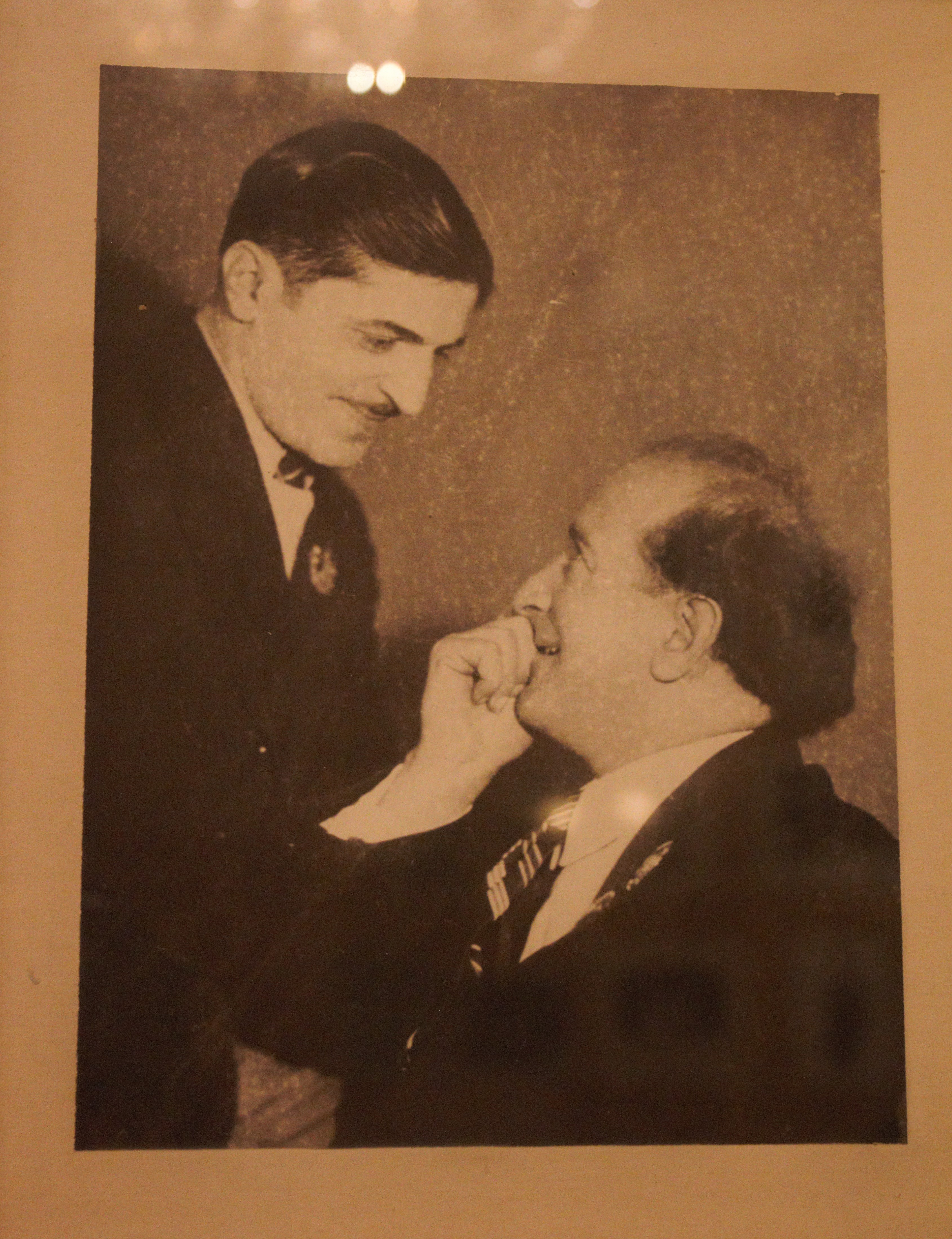 Советский азербайджанский дирижёр и композитор Ниязи и советский азербайджанский оперный певец Бюльбюль.